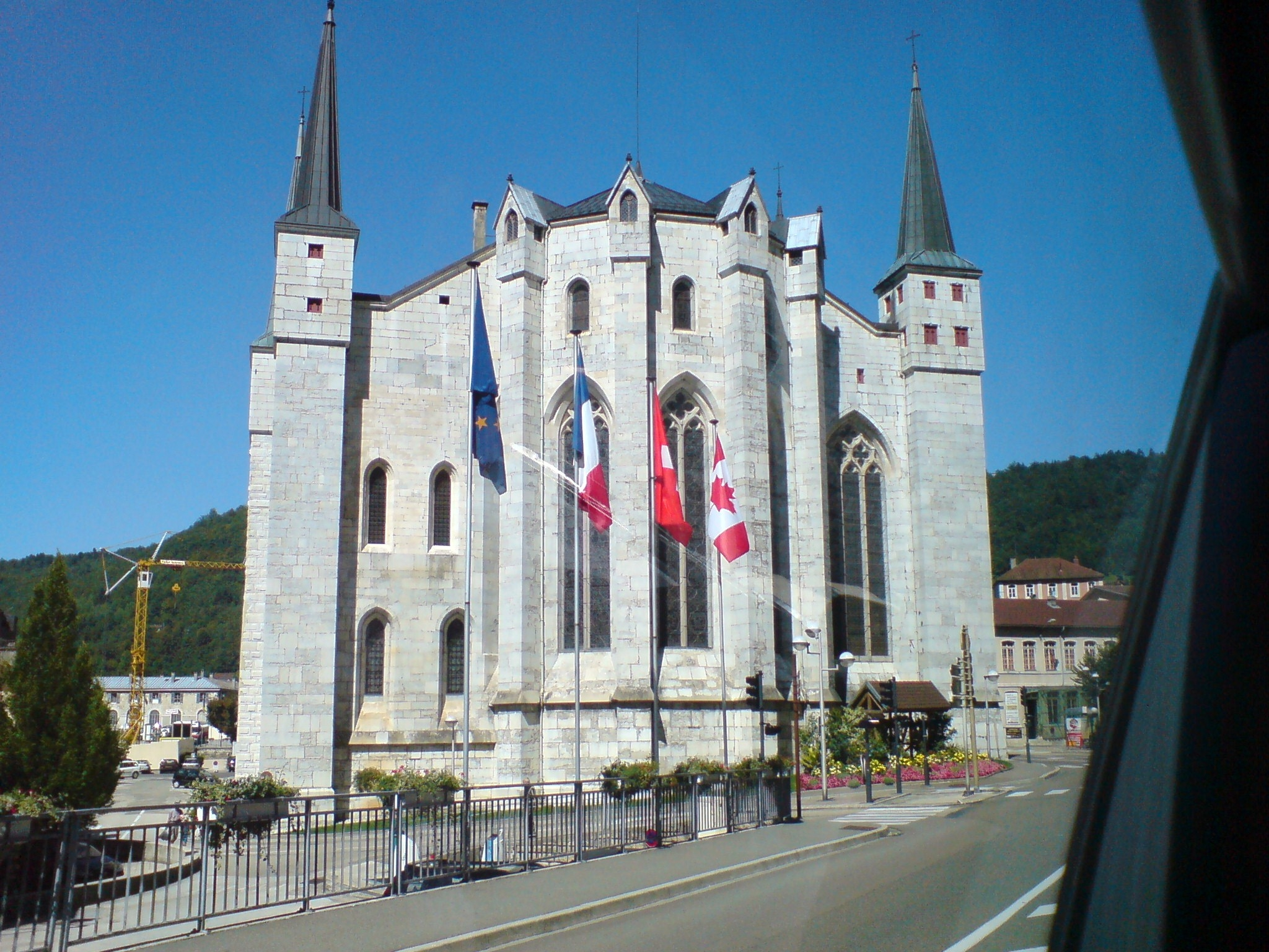 Il s'agit de la Cathédrale à Saint-Claude vue de l'arrière